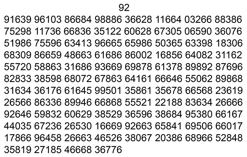 Szyfrowanie szyfrem VIC – ostateczna postać szyfrogramu